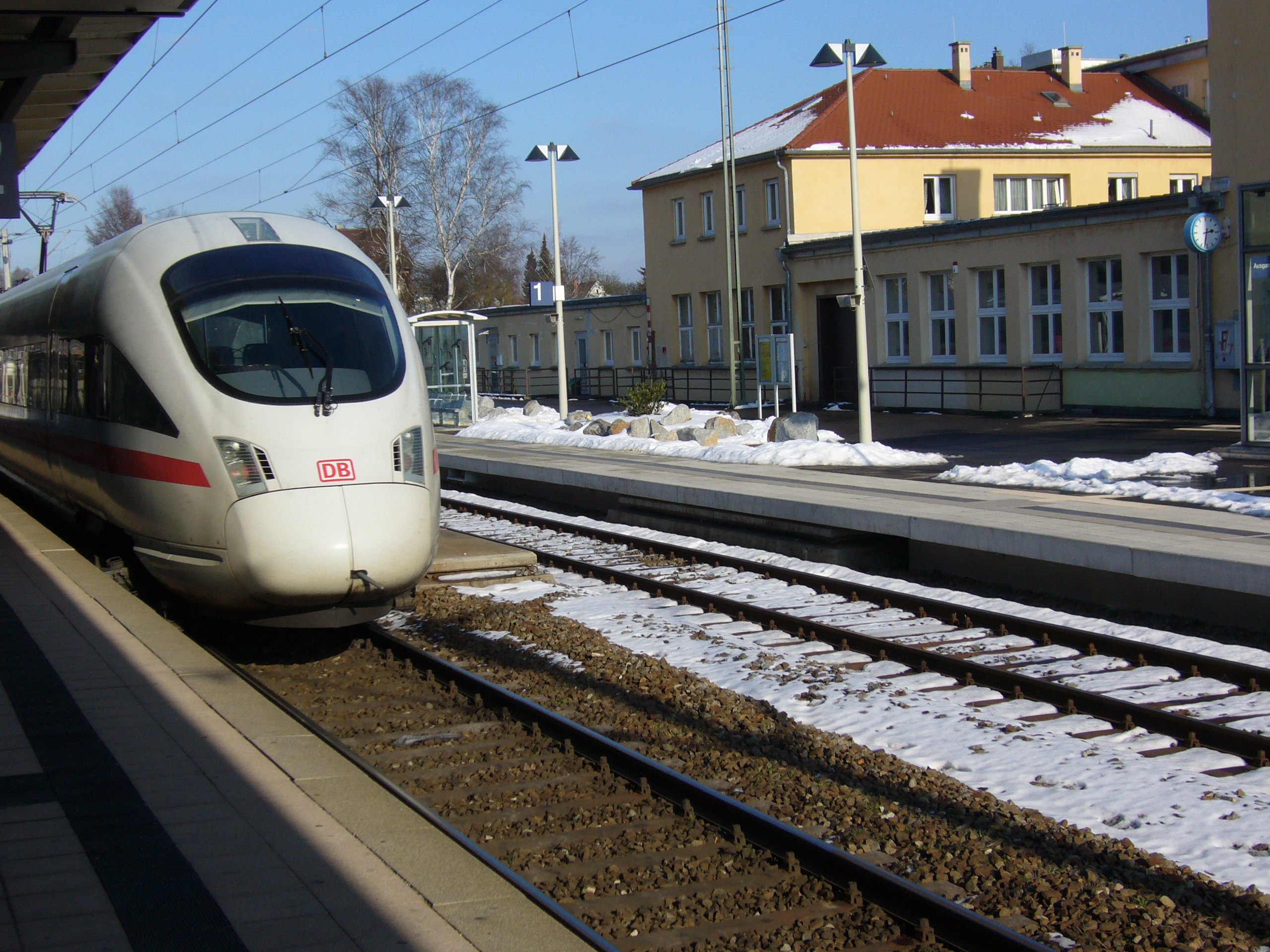 ICE-T im Bahnhof Tuttlingen